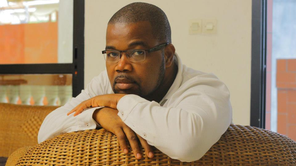 David Tayorault